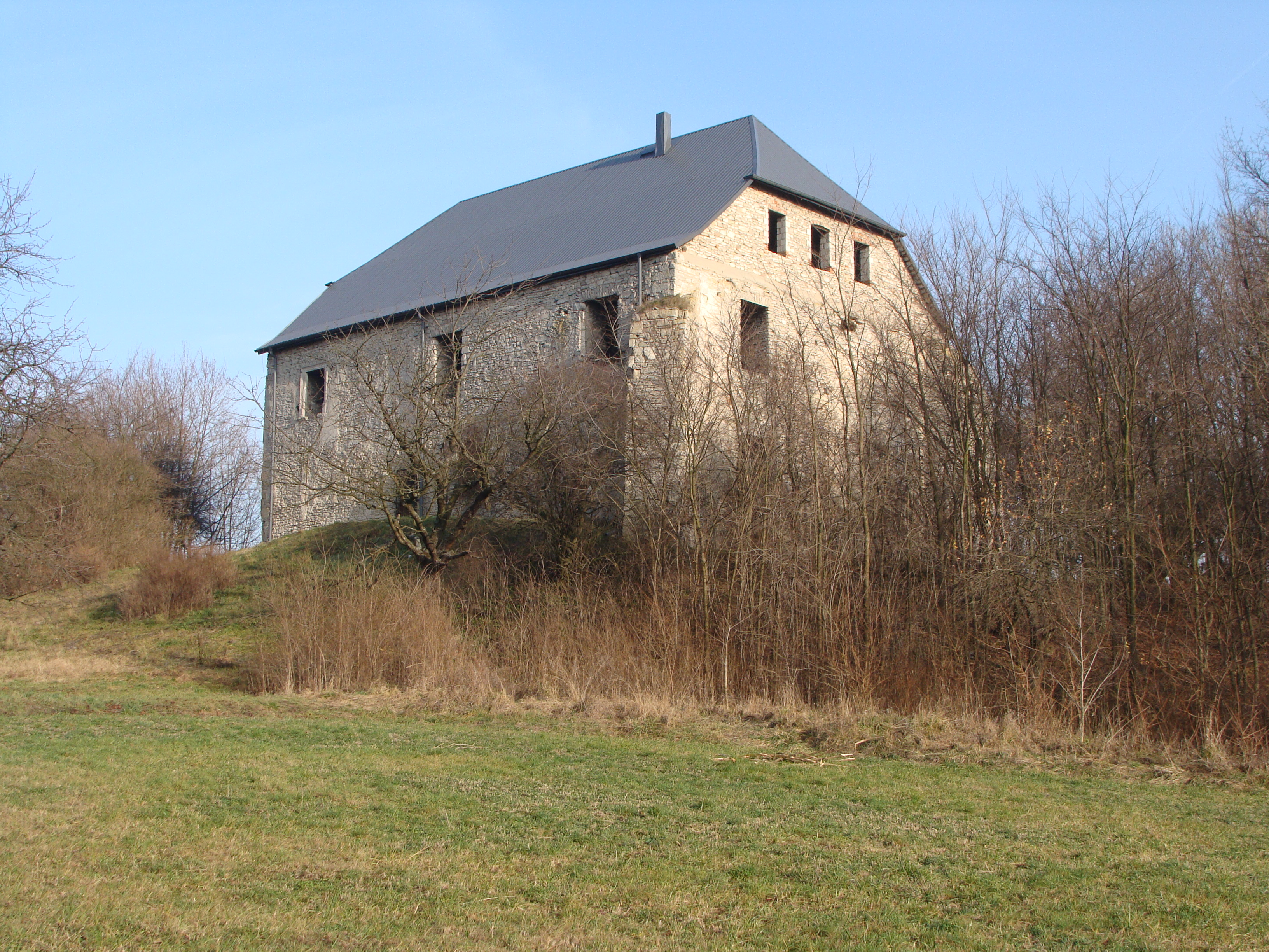 Szaniec kościół ariański